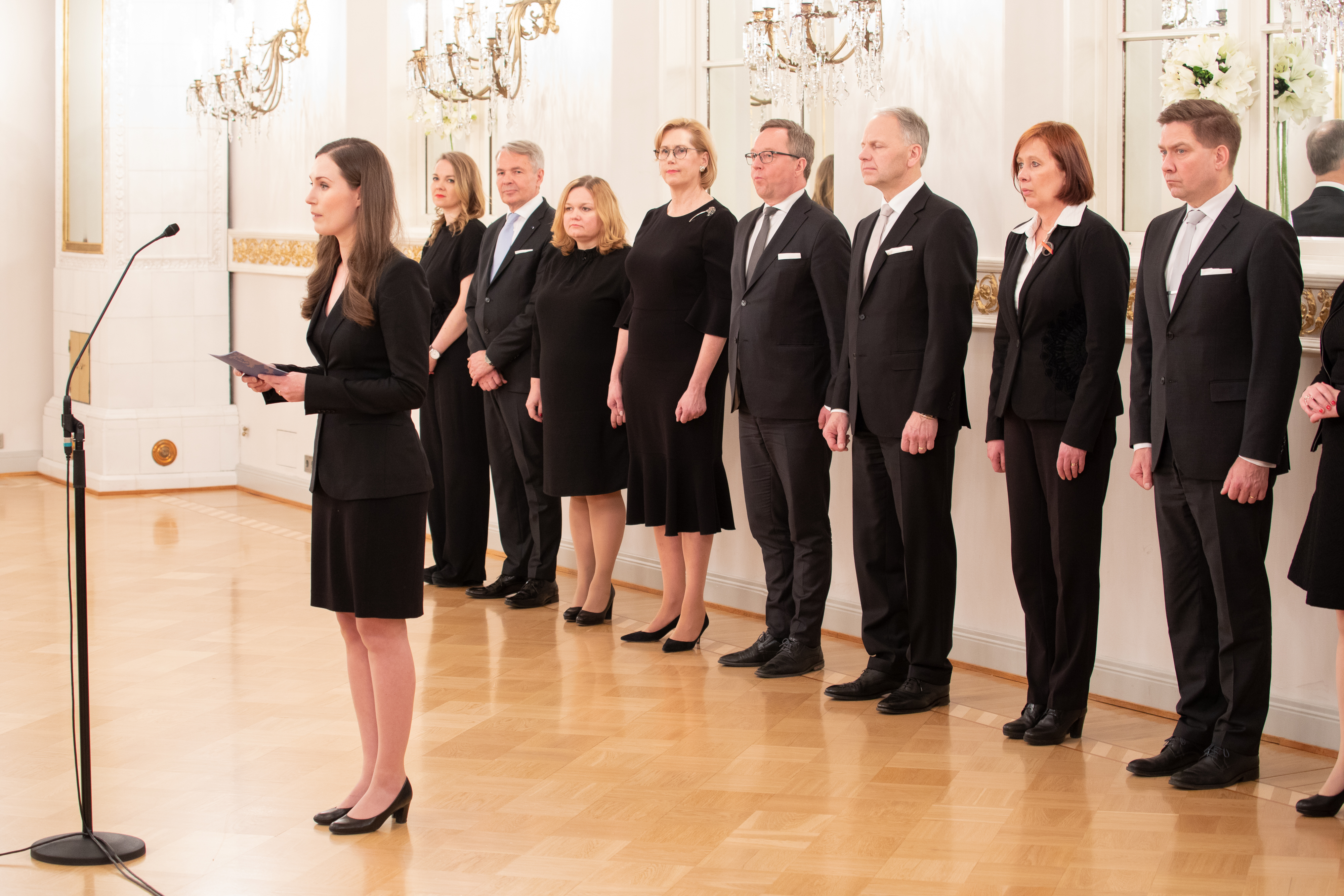 Marinin hallituksen tervehdyskäynti Presidentinlinnassa. © Kosti Keistinen / valtioneuvoston kanslia